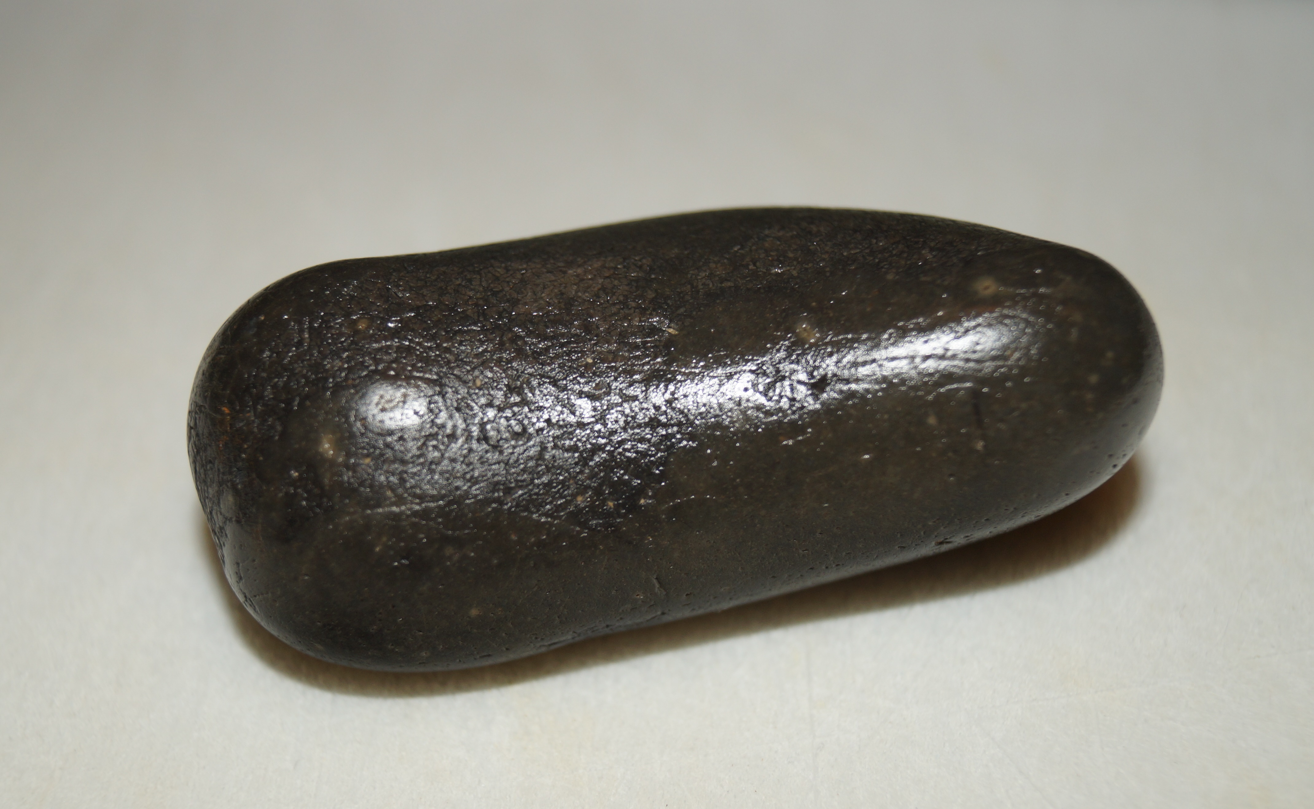 Mass-Ei vom Liedberg in der Niederheinischen Bucht